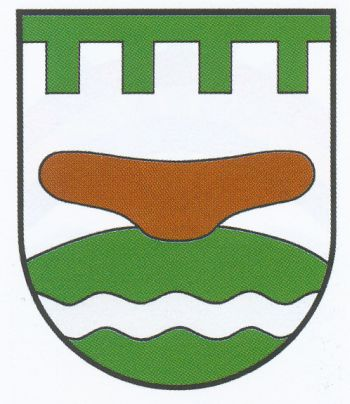 Oolsche Wappen van de Dörp Groot Steinum